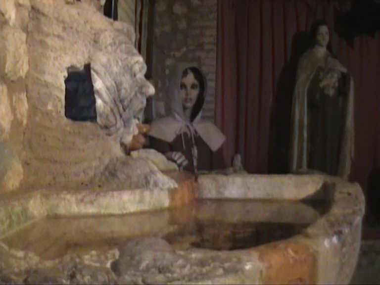 La Fontaine Ste Catherine dans l'Abbaye de Mortemer.